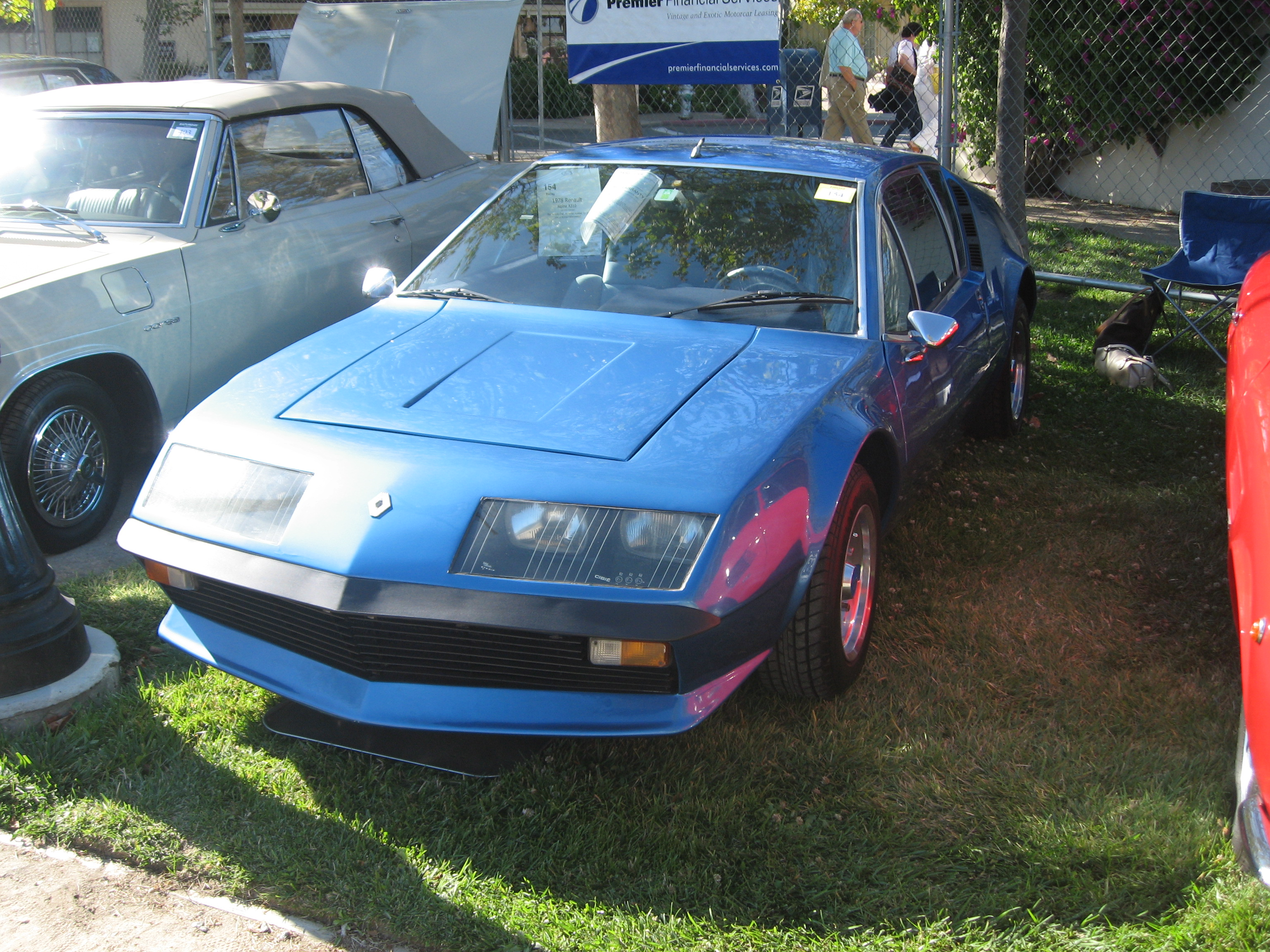 Face avant d'une Renault Alpine A310 de 1978.